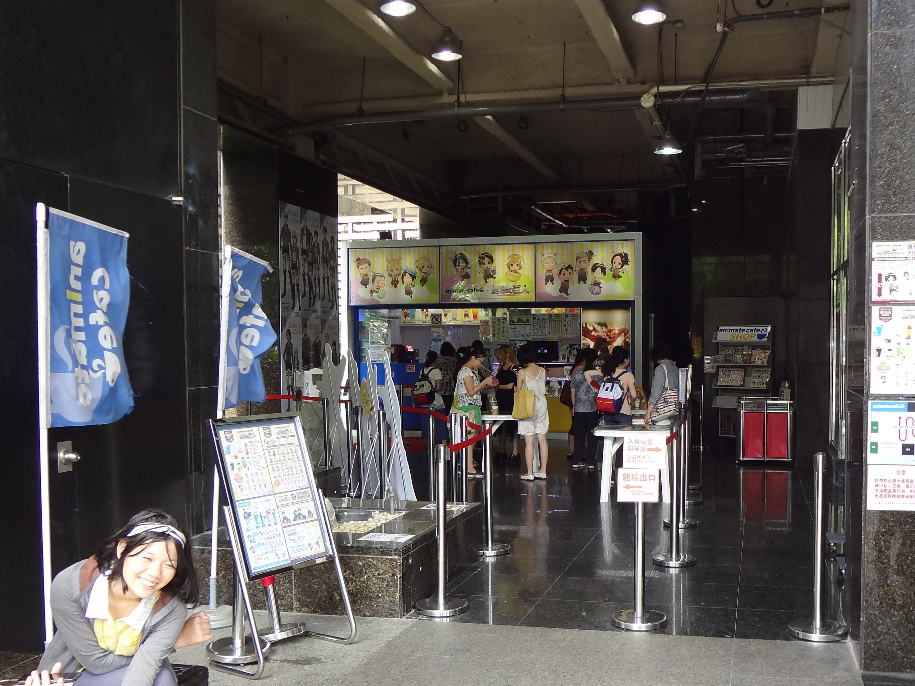 安利美特旗下咖啡廳「Animate cafe台北出張店」，位於台糖騰雲大樓一樓。拍攝時正值Animate cafe台北出張店《進擊的巨人》咖啡廳活動期間。